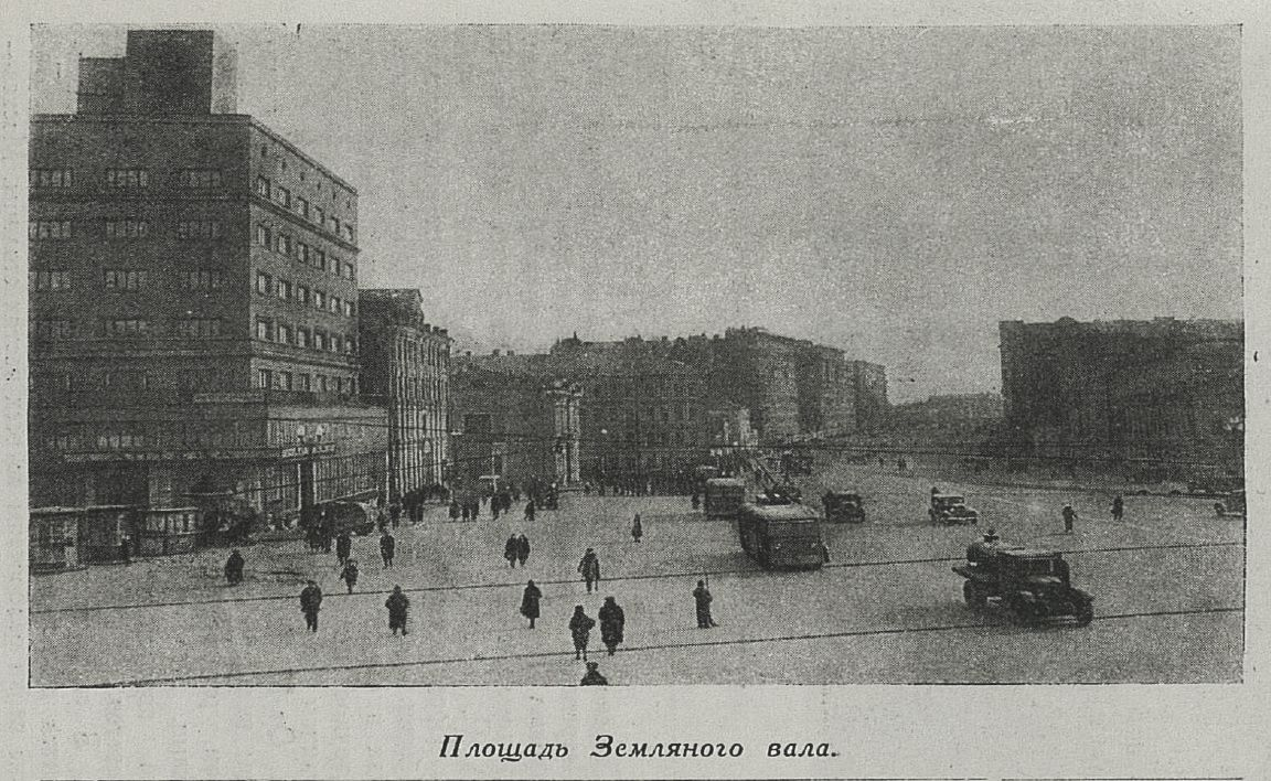 Москва Площадь Земляного вала